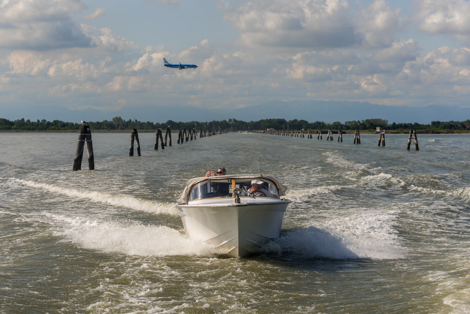 La Lagune, Venise, Italie